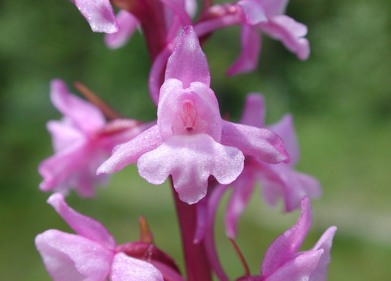 Mücken-Händelwurz (Gymnadenia conopsea), Blütenpracht im Isar-Tal bei Garmisch, Bayern, Deutschland